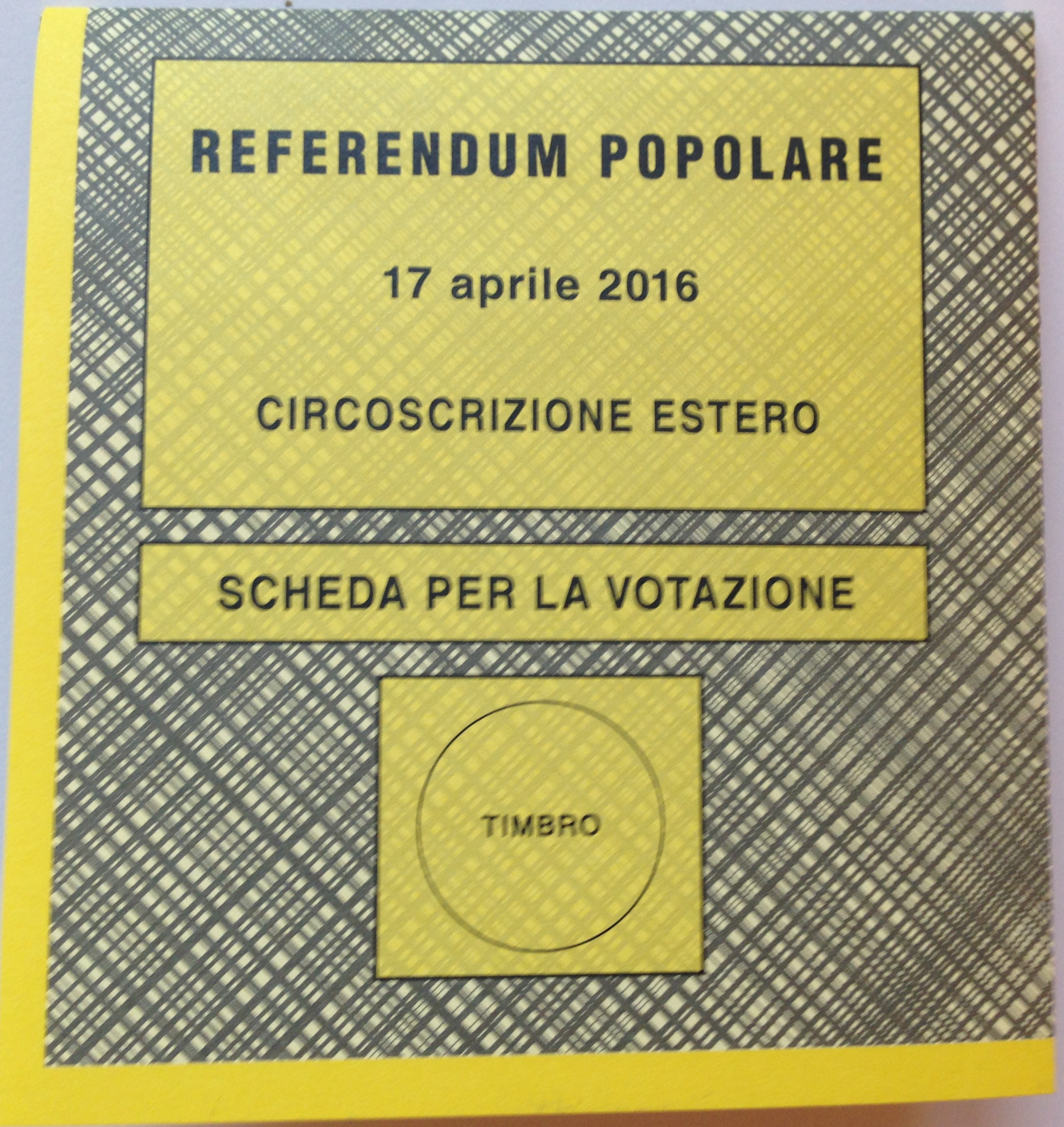 Referendum popolare del 17 aprile 2016. Frontespizio della scheda referendaria destinata al voto per corrispondenza dei cittadini italiani residenti all'estero.